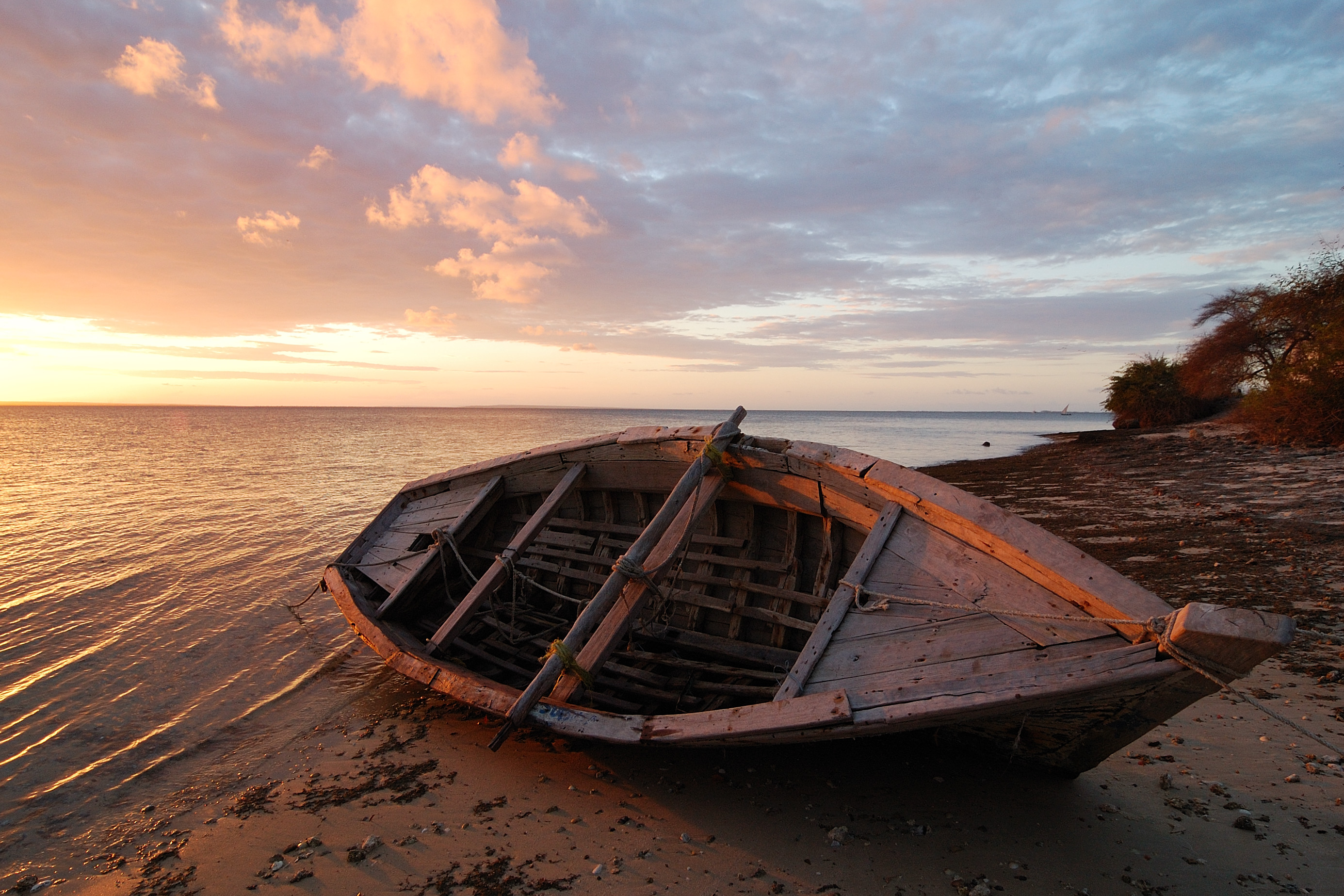 Ilha do Ibo, Moçambique [2009]